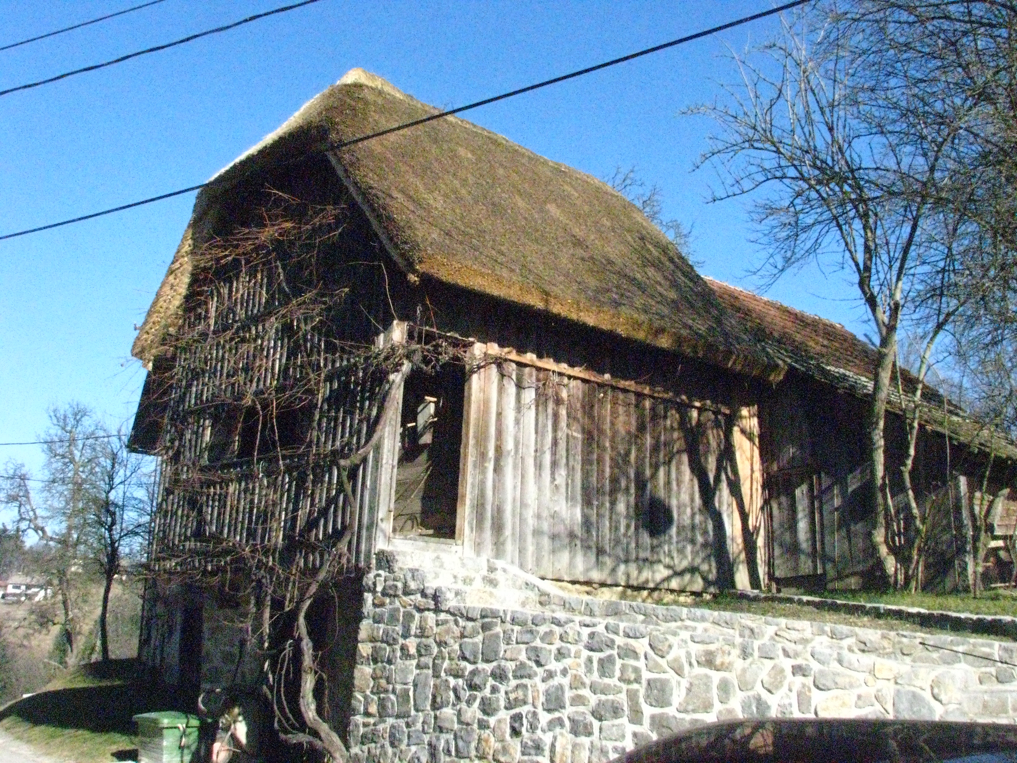 Stritar Granary, Podsmreka, Slovenija